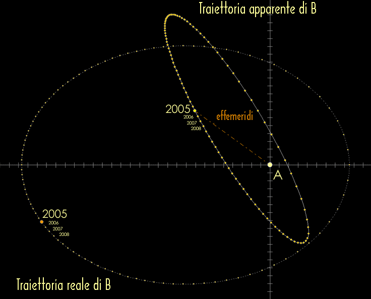 Traduzione dell'immagine :Image:AlphaCentauri AB Trajectory.gif